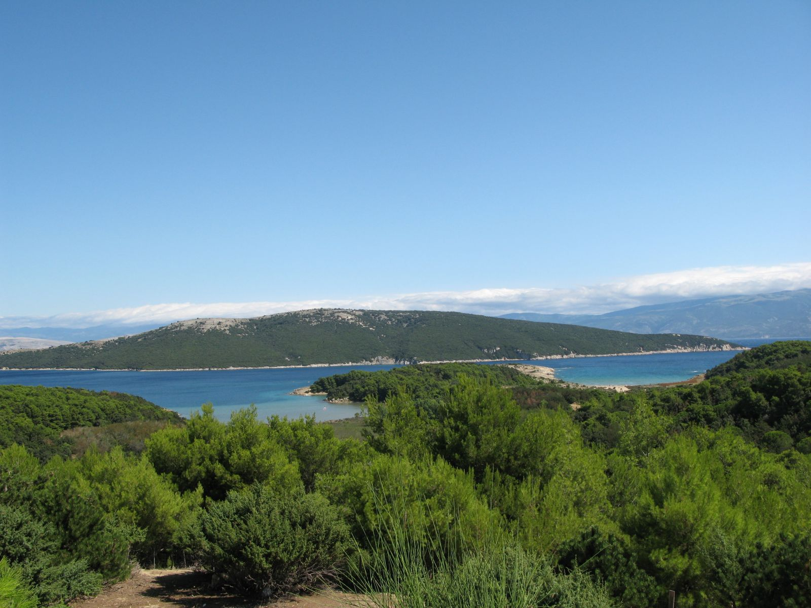 Lopar